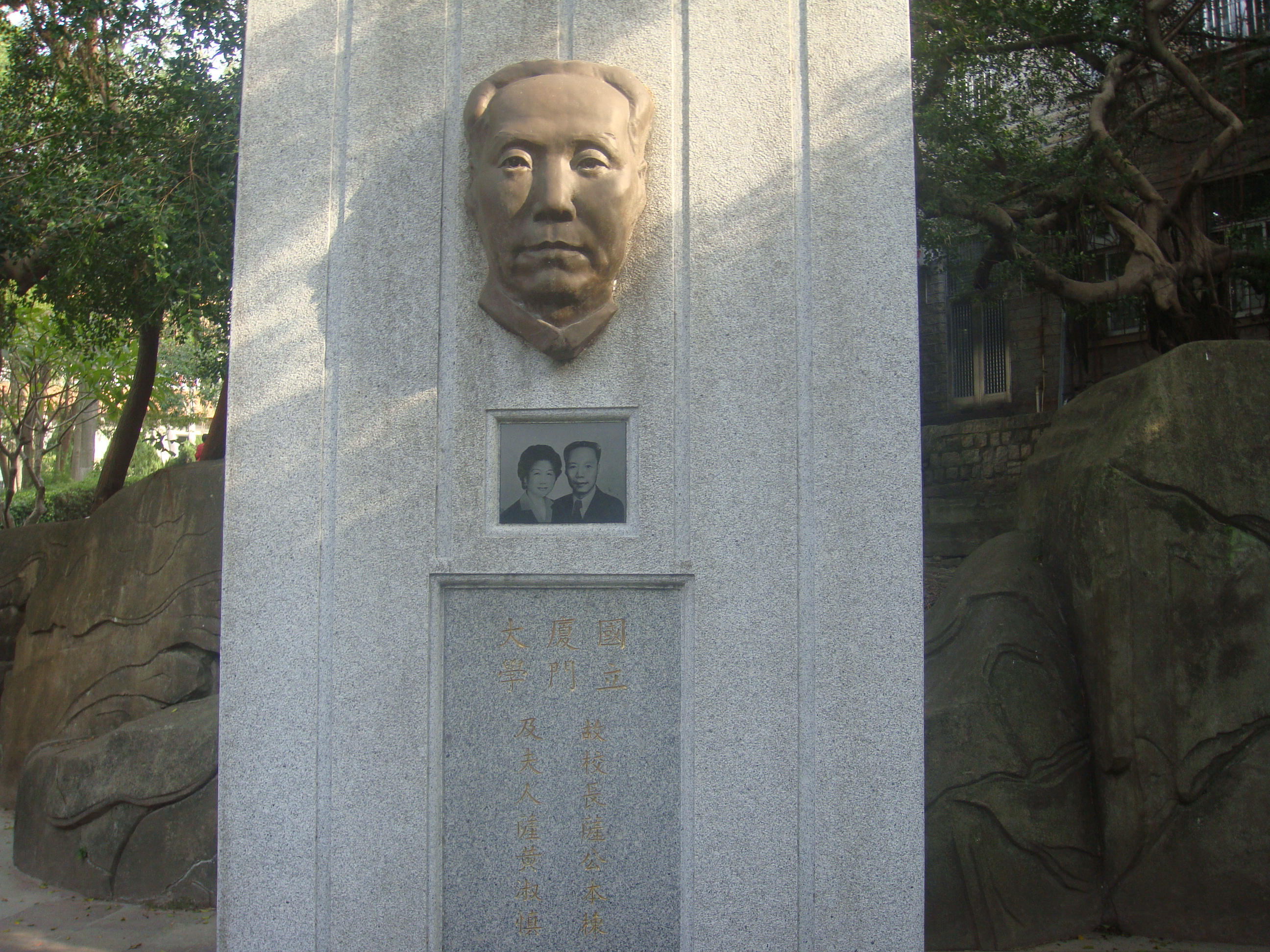 厦门大学内的薩本棟墓碑。